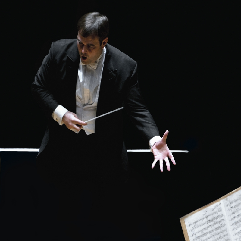 Fotografía de Josep Caballé Domenech en concierto.